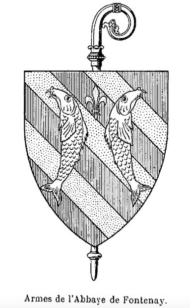 Lucien Bégule, L'abbaye de Fontenay et l'architecture cistercienne, Paris, Éditions Laurens